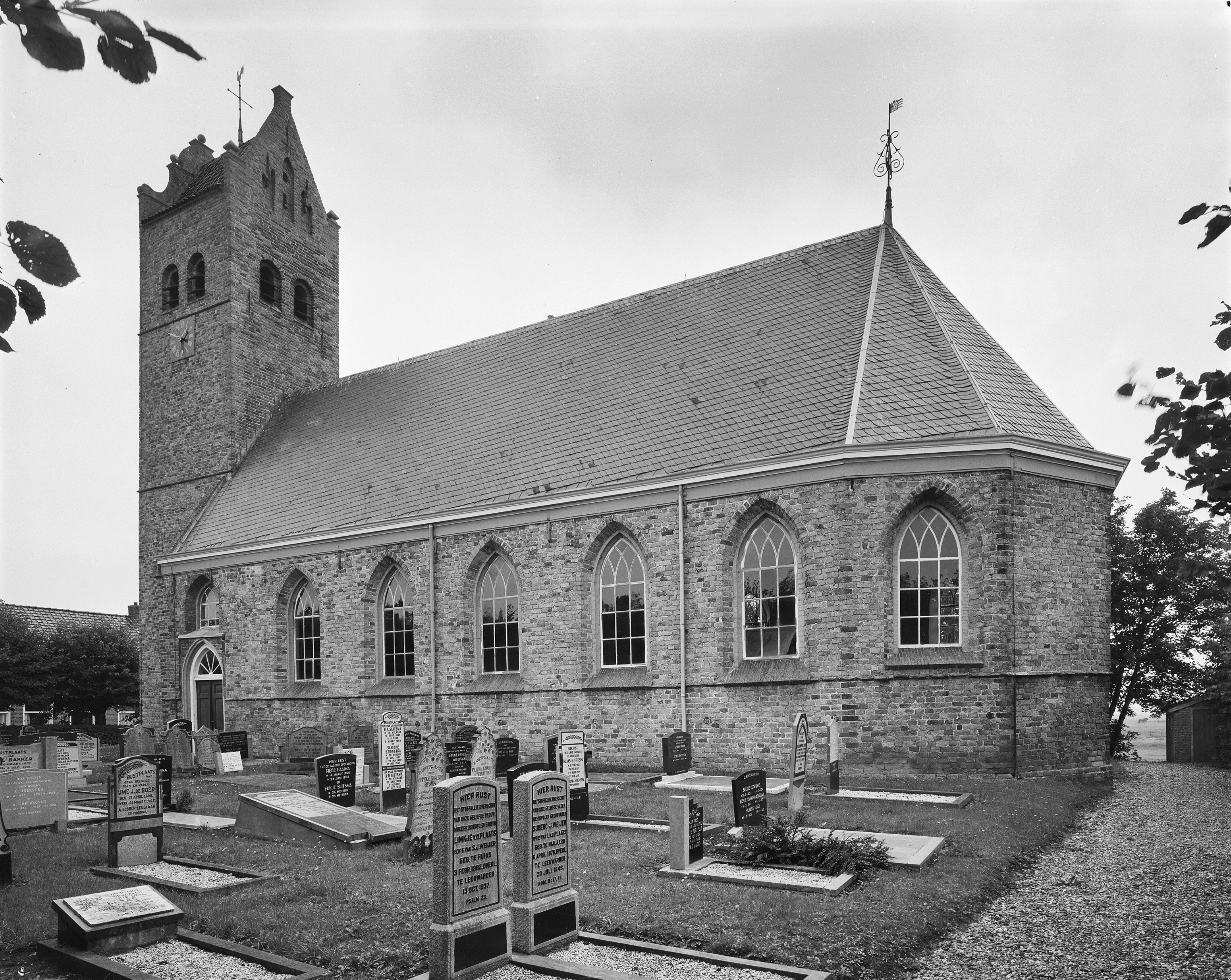 Nederlands Hervormde Kerk: Exterieur ZUIDGEVEL